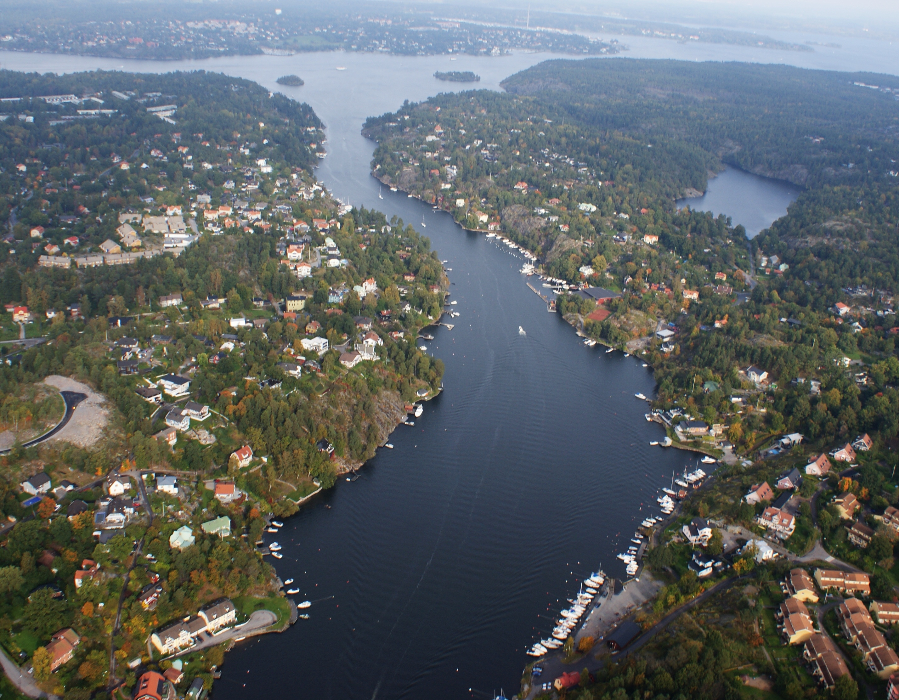 Skurusundet sedd från helikopter.